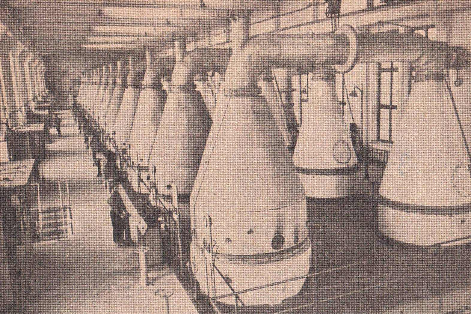 Utlenianie amoniaku w Zakładach Azotpwych w Kędzierzynie (ca. 1960)